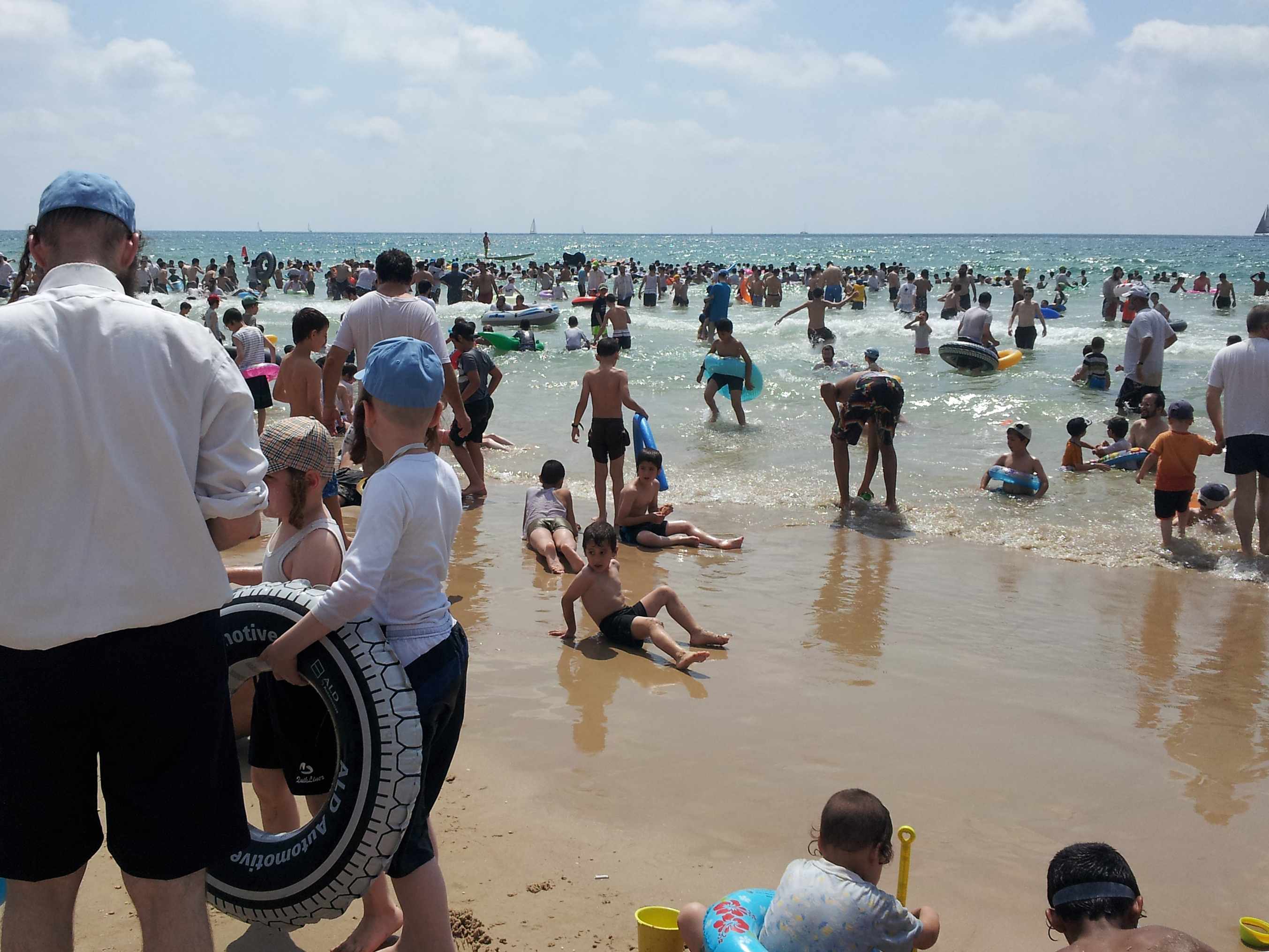 החוף הנפרד בהרצליה